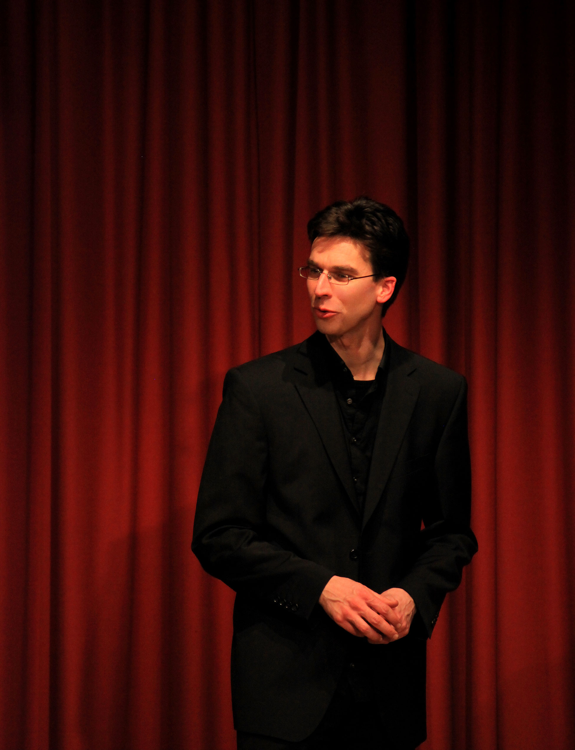 Impuls an der Ernst-Abbe-Hochschule Jena